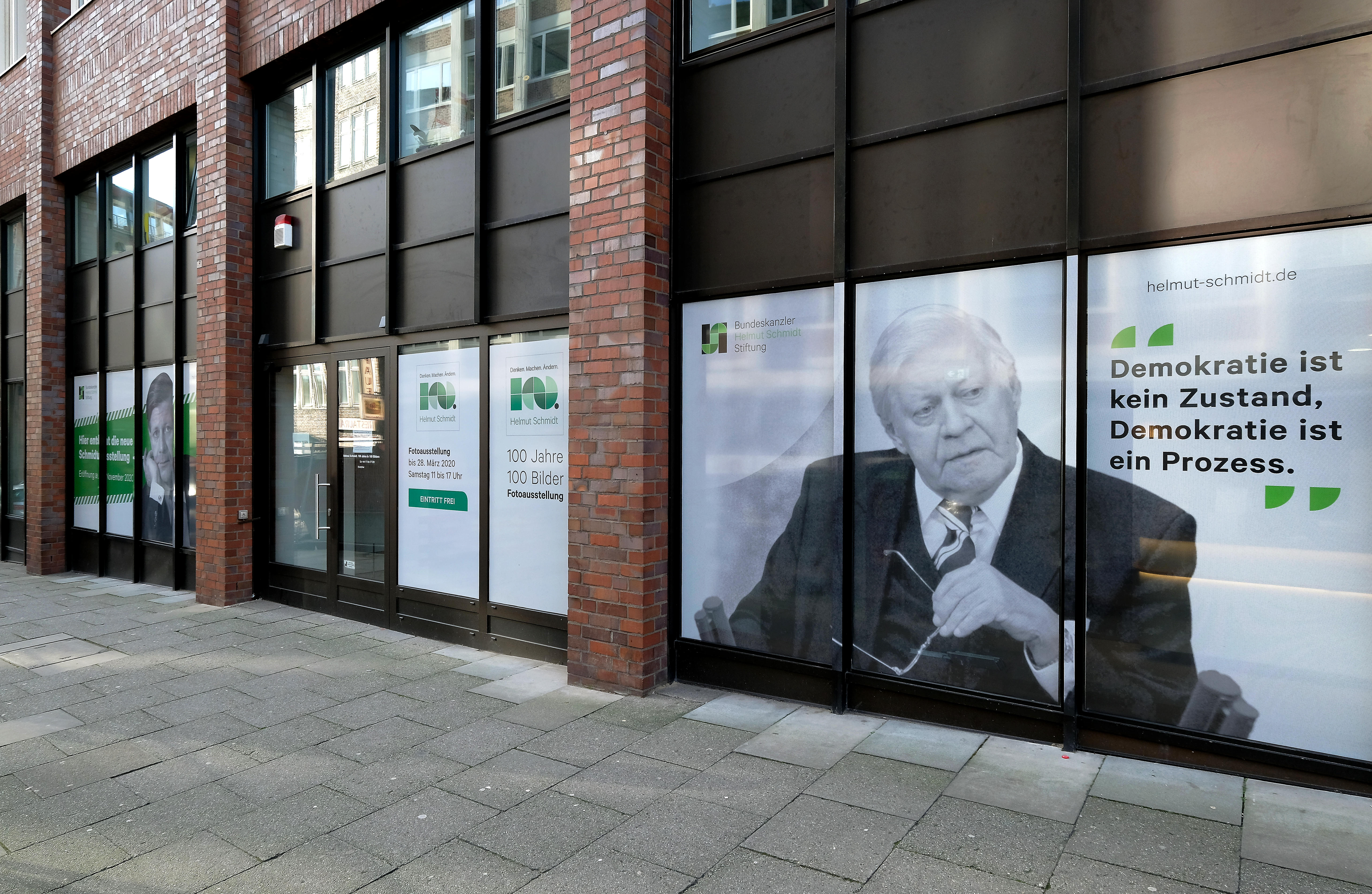 Sitz der Bundeskanzler-Helmut-Schmidt-Stiftung, Kattrepel 10 in Hamburg